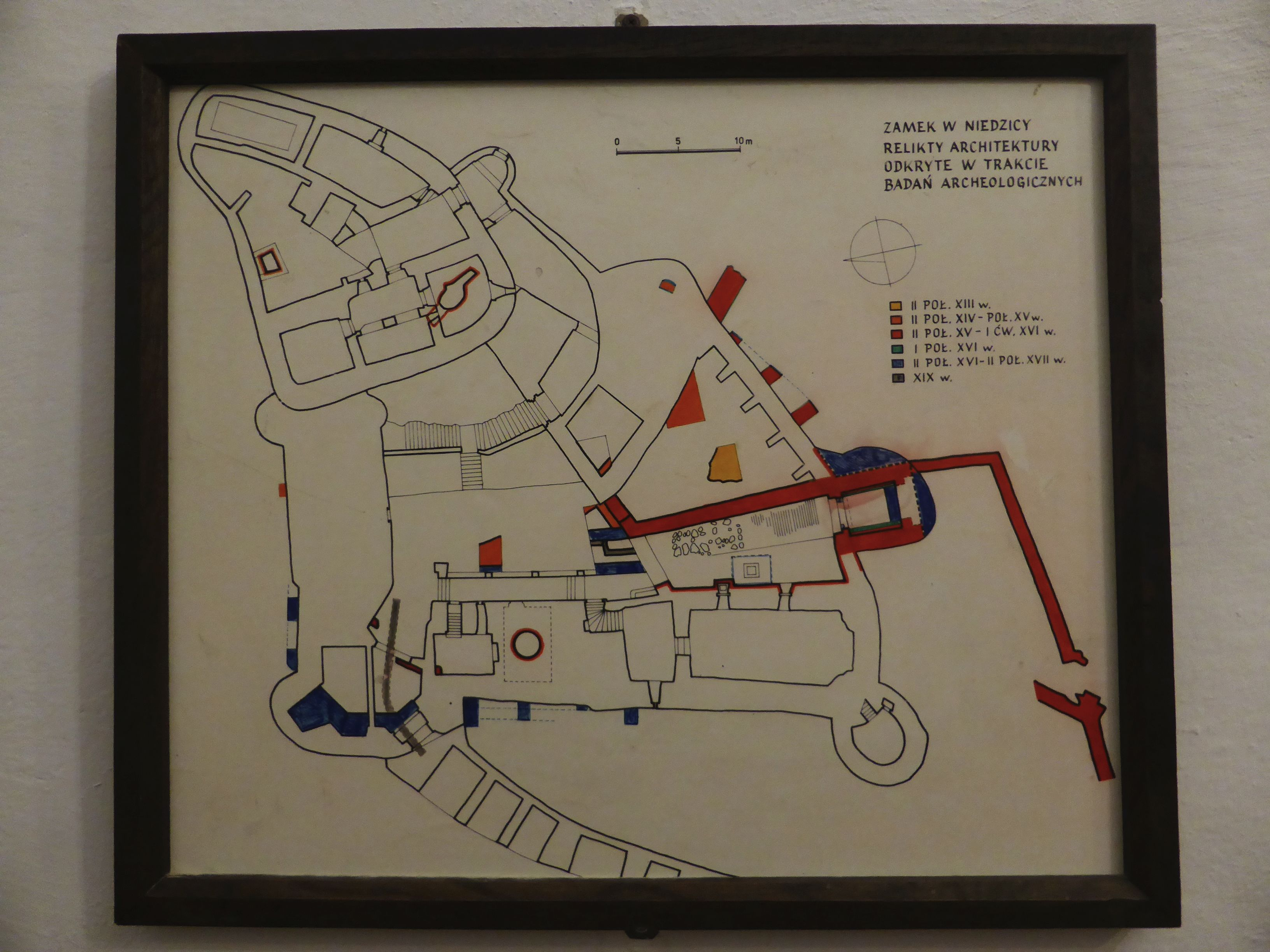 Niedzica Castle - Plan der Burg